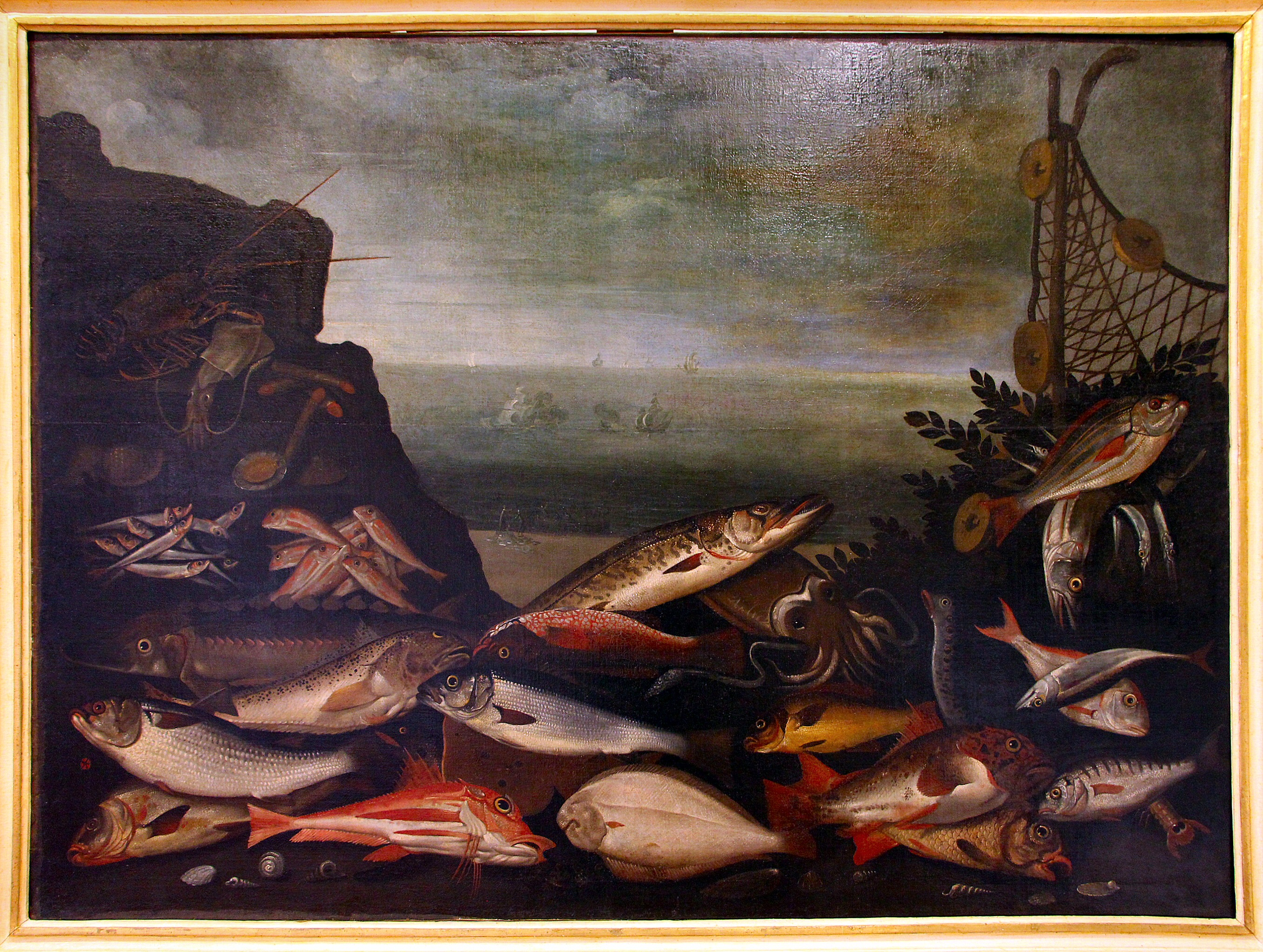 Villa medicea di Poggio a Caiano - MIBAC The making of this document was supported by Wikimedia CH. (Submit your project!) For all the files concerned, please see the category Supported by Wikimedia CH. This is a photo of a monument which is part of cultural heritage of Italy.